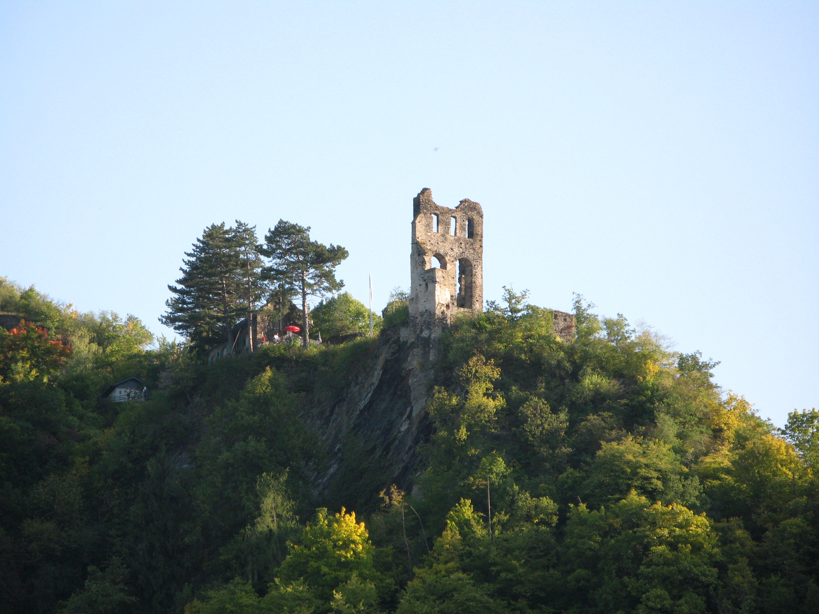 Grevenburg über der Stadt Traben-Trarbach